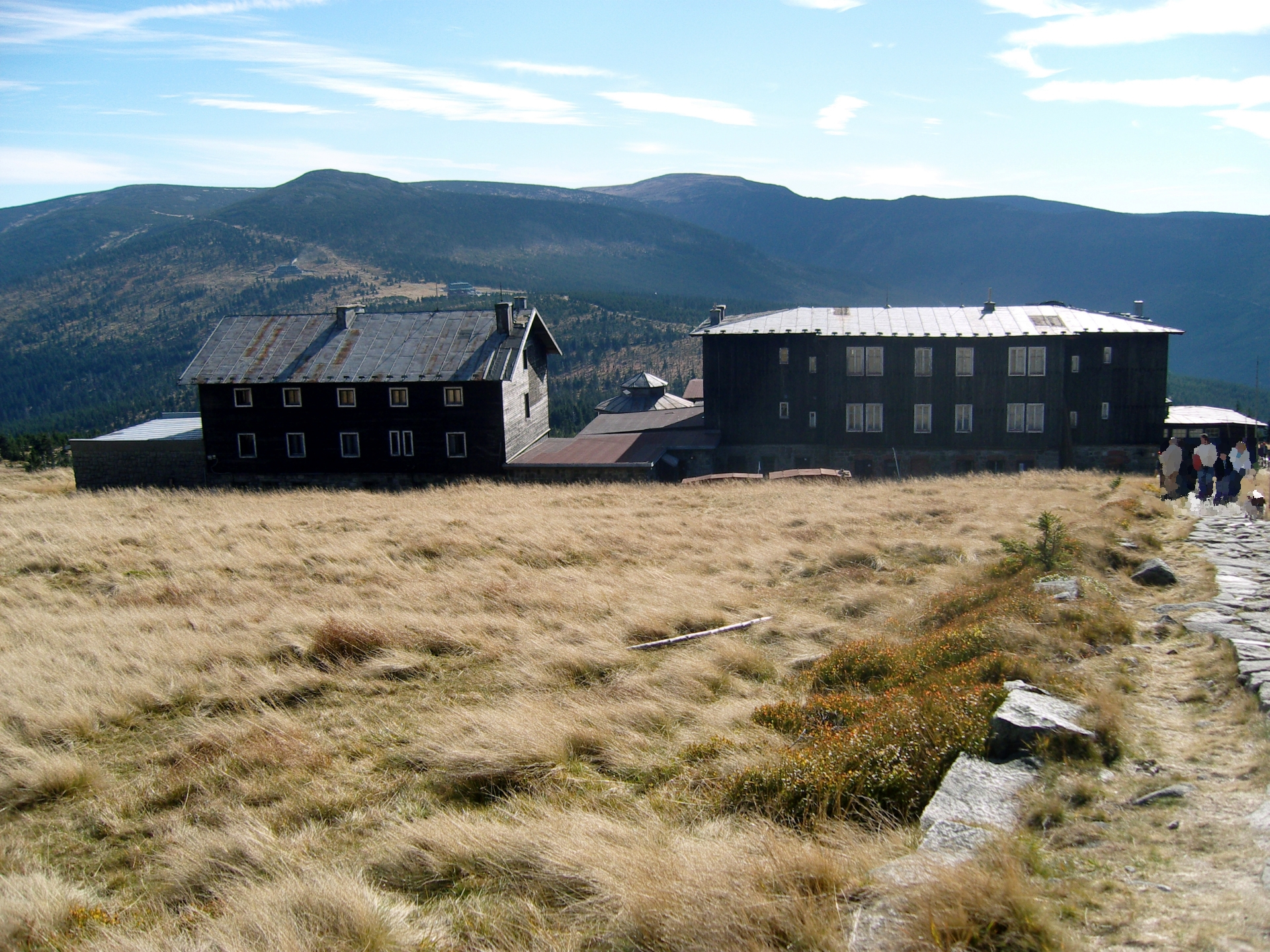 Peterbaude im Herbst 2010, oberhalb von Agnetendorf, an der 1178m hohen Mädelwiese; der grossen Senke des mittleren Riesengebirgskammes, heute Spindelmühle, Tschechien, Blick nach Osten, 1288m, (Oberhalb des linken Gebäudes; v.l.n.r. ehem. Jugendkammhaus Rübezahl(1240m) 1929 als Jugendherberge am Spindlerpass für 20000 Reichsmark erbaut, damals 300 Betten, Gemeinde Hain - Spindlerbaude (1209m) damals Kamm-und Passbaude des Spindlerpasses dem Übergang ins Schlesische Hain, am Fuß der Kleinen Sturmhaube gelegen, errichtet 1824 durch Franz Spindler)